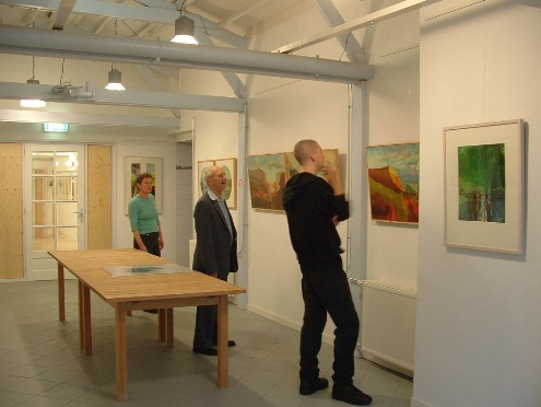 Expositie Rineke Hollemans bij Galerie Thyencamp in Hooghalen